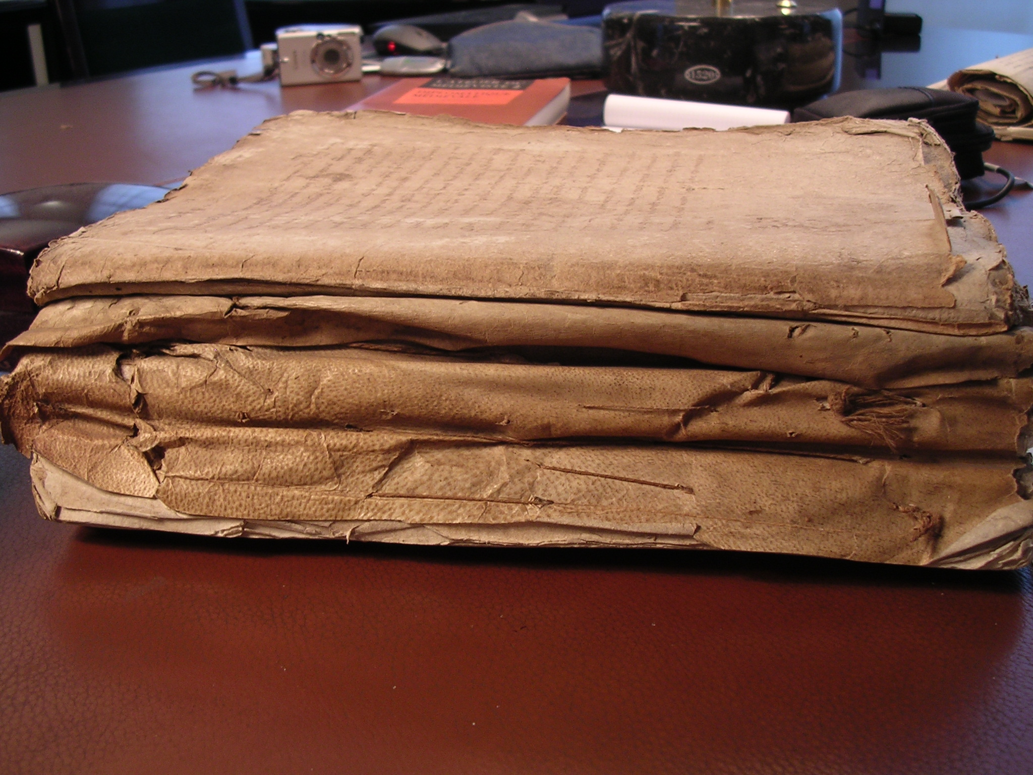 Manuscrit de la défense de Pierre Gerbais durant son procès pour empoisonnement en 1380. Dépositions de témoins et autres documents. Archives de Turin (Italie)